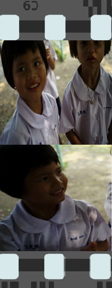 รูปนักแสดงจากหนังเรื่อง เด็กสาว -ถ่ายจากจังหวัดอยุธยา